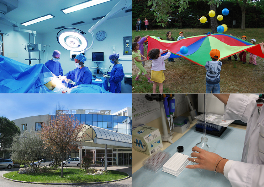 4 missions de l'ICM